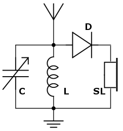 Schéma krystalky s laděným LC obvodem